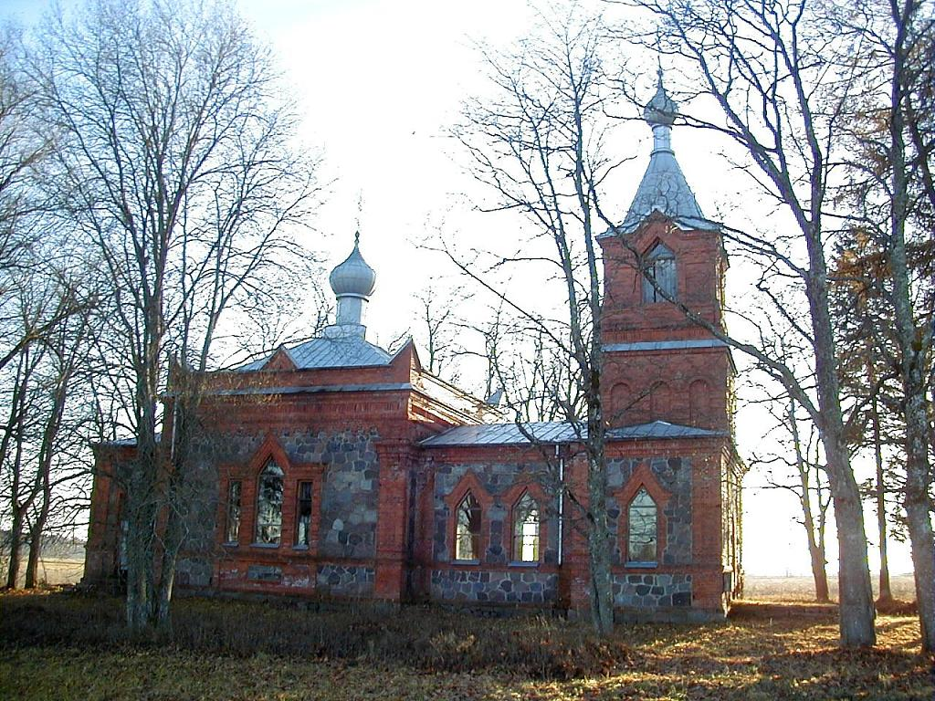 Skaņkalnes pareizticīgo baznīca 2003-11-08